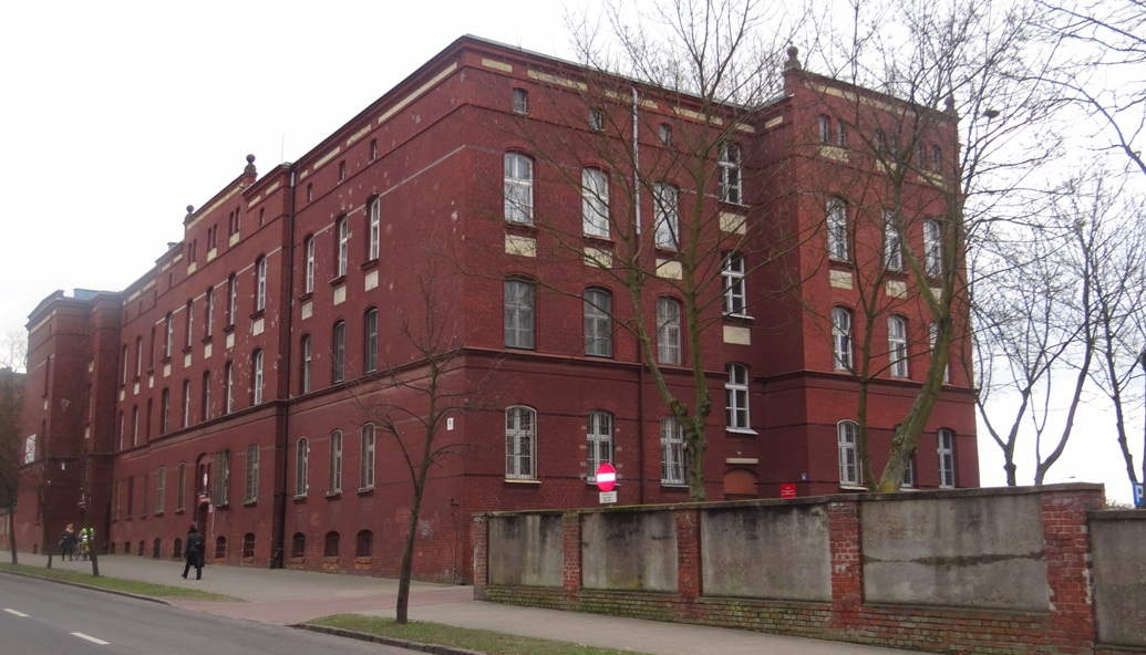 Grupa Zabezpieczenia 15 WOG w Stargardzie Szczecińskim